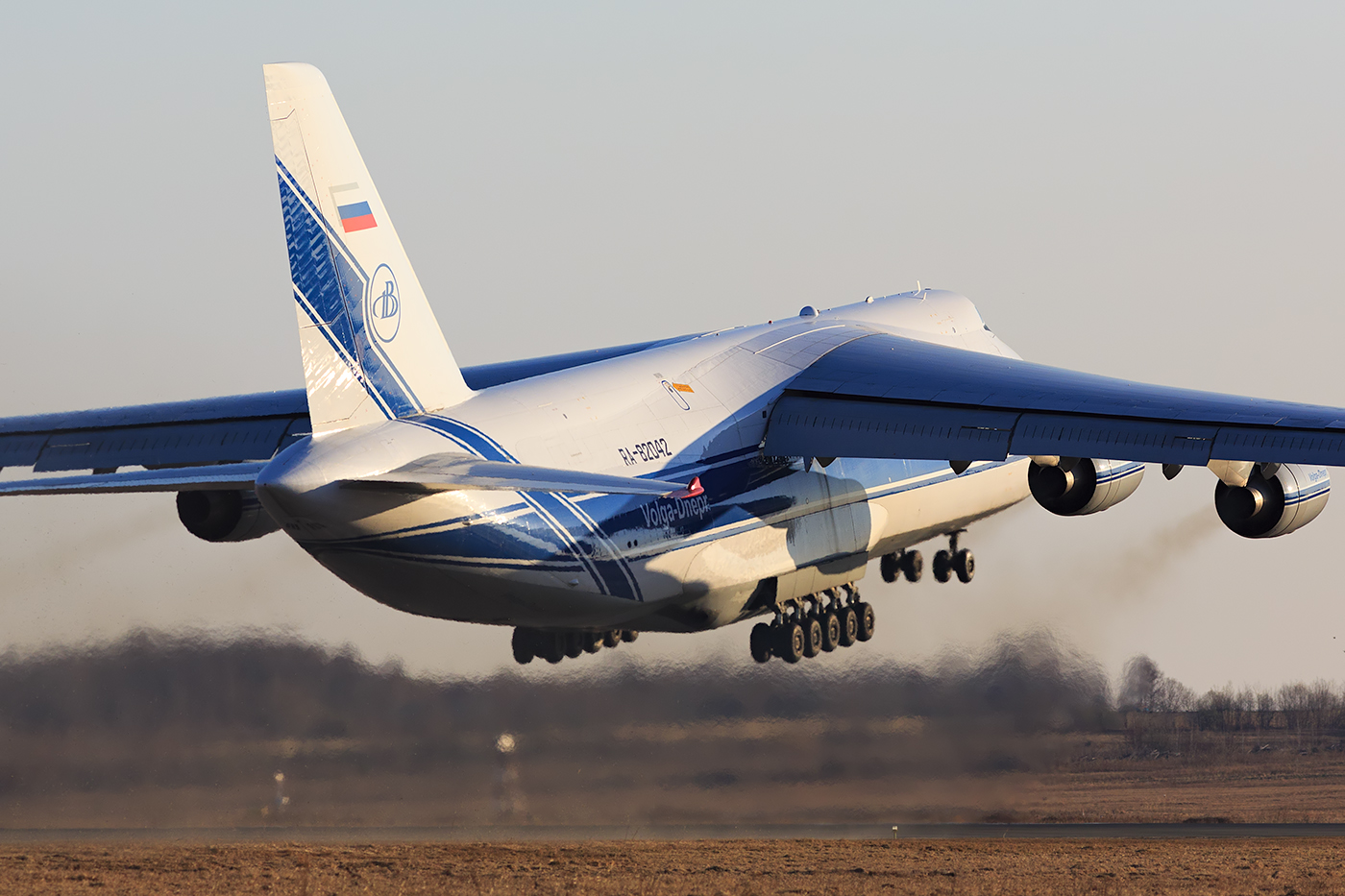 Volga-Dnepr Antonov An-124 at Vladivostok Airport